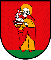 Gemeinde St. Johann im Pongau: Im roten Schilde die auf einem grünen Boden stehende, halb rechts gewendete Figur des hl. Johannes des Täufers mit gelblichem Unter- und braunem, lodenfärbigen Obergewande, in der Rechten ein Buch mit daraufliegendem Osterlamm mit Fahne haltend.